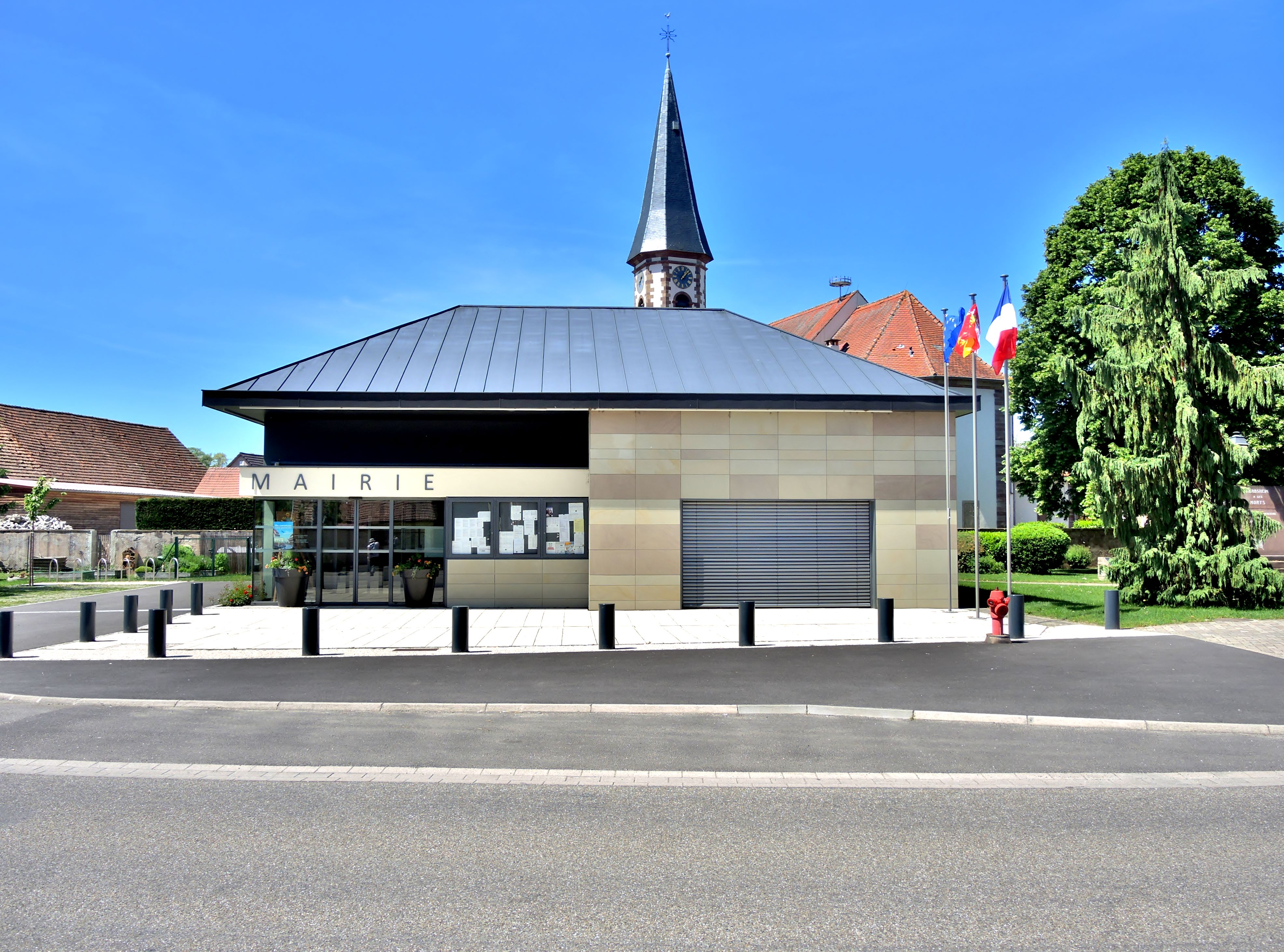 Façade de la mairie d'Herbsheim. Bas-Rhin